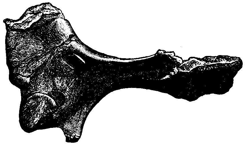 Stereorhachis dominans humerus.